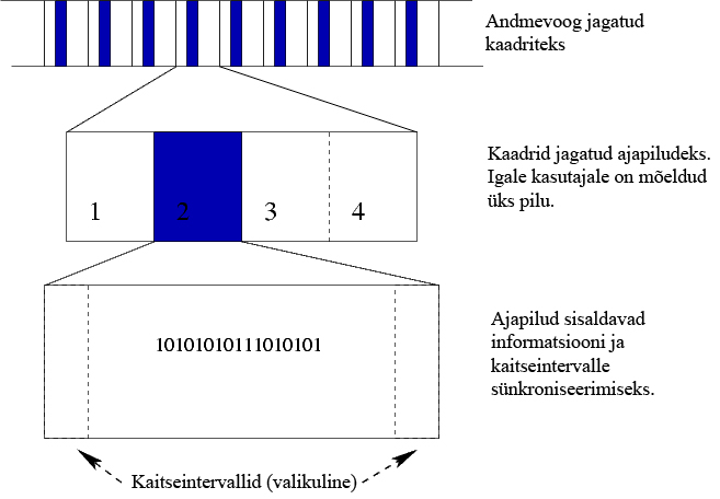 TDMA struktuur, kus on näha kuidas andmevoog jagatakse kaadriteks ning need omakorda ajapiludeks, mis määratakse konktreetsele kasutajale.